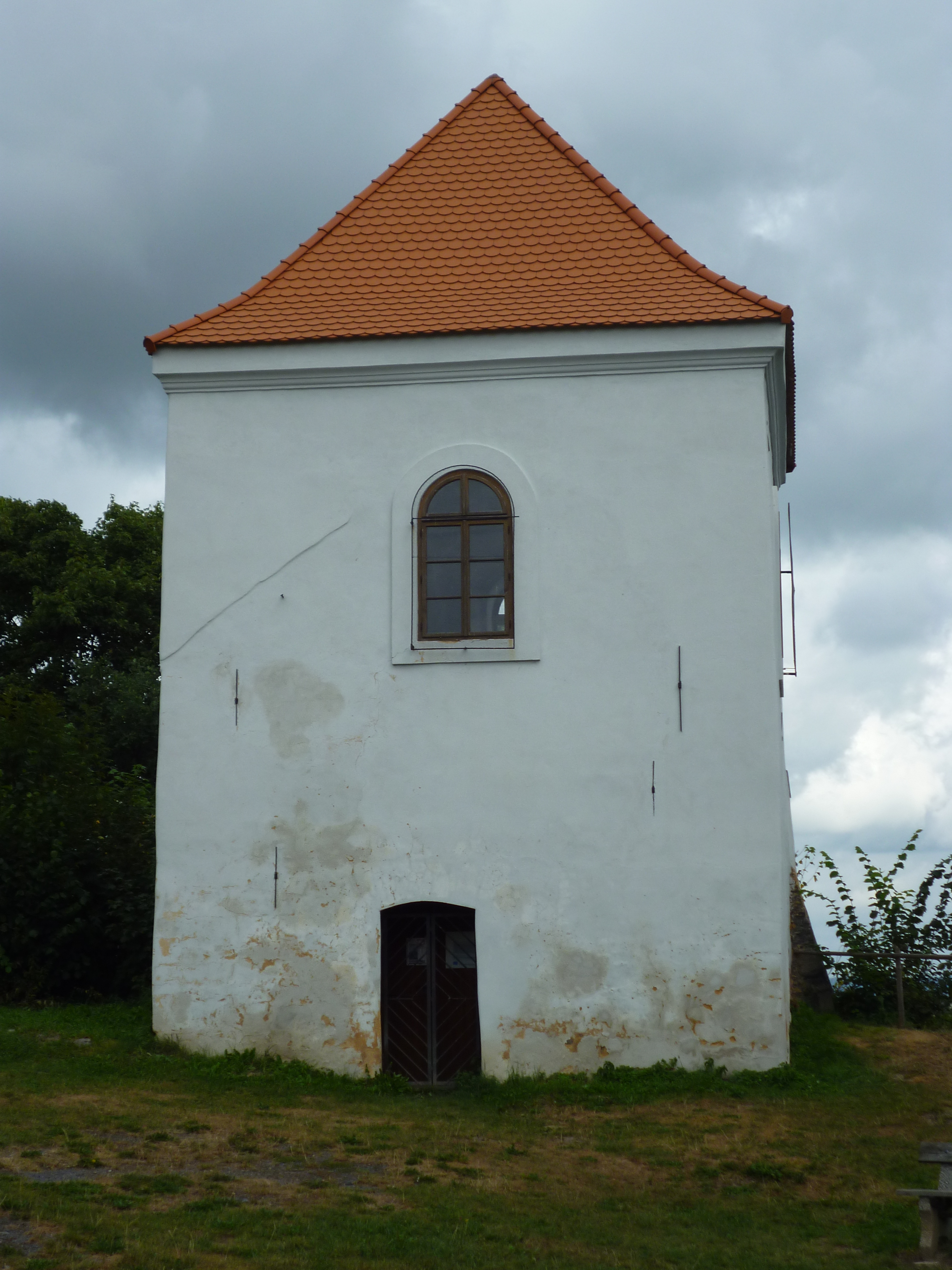 Zvonice v předhradí hradu Krasíkov